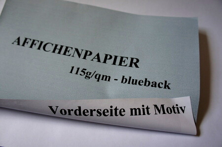 Affichenpapier mit blauen Hintergrund (Blueback)